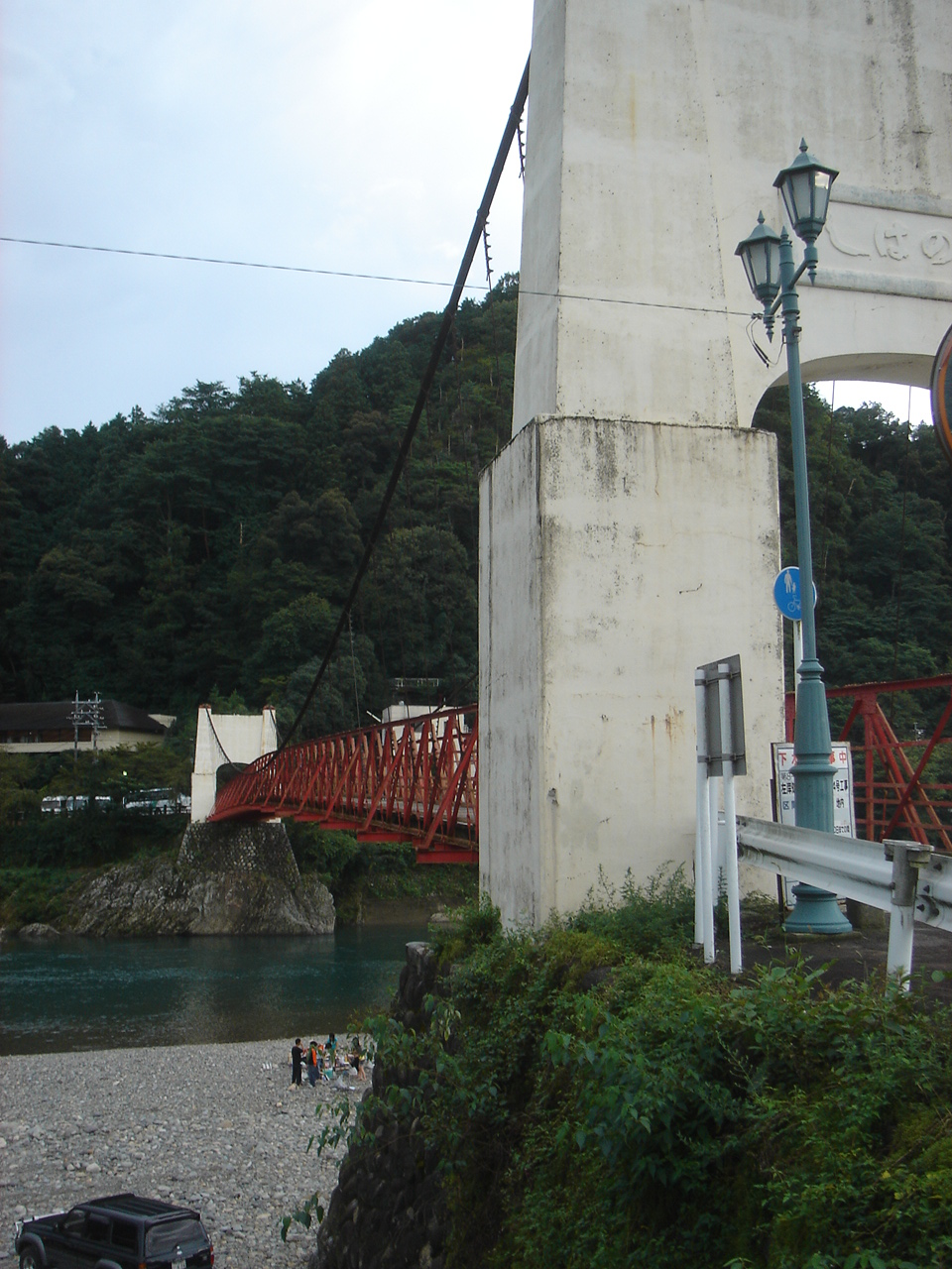 Mino Hashi(美濃橋),Mino,Gifu,Japan(岐阜県美濃市)で撮影